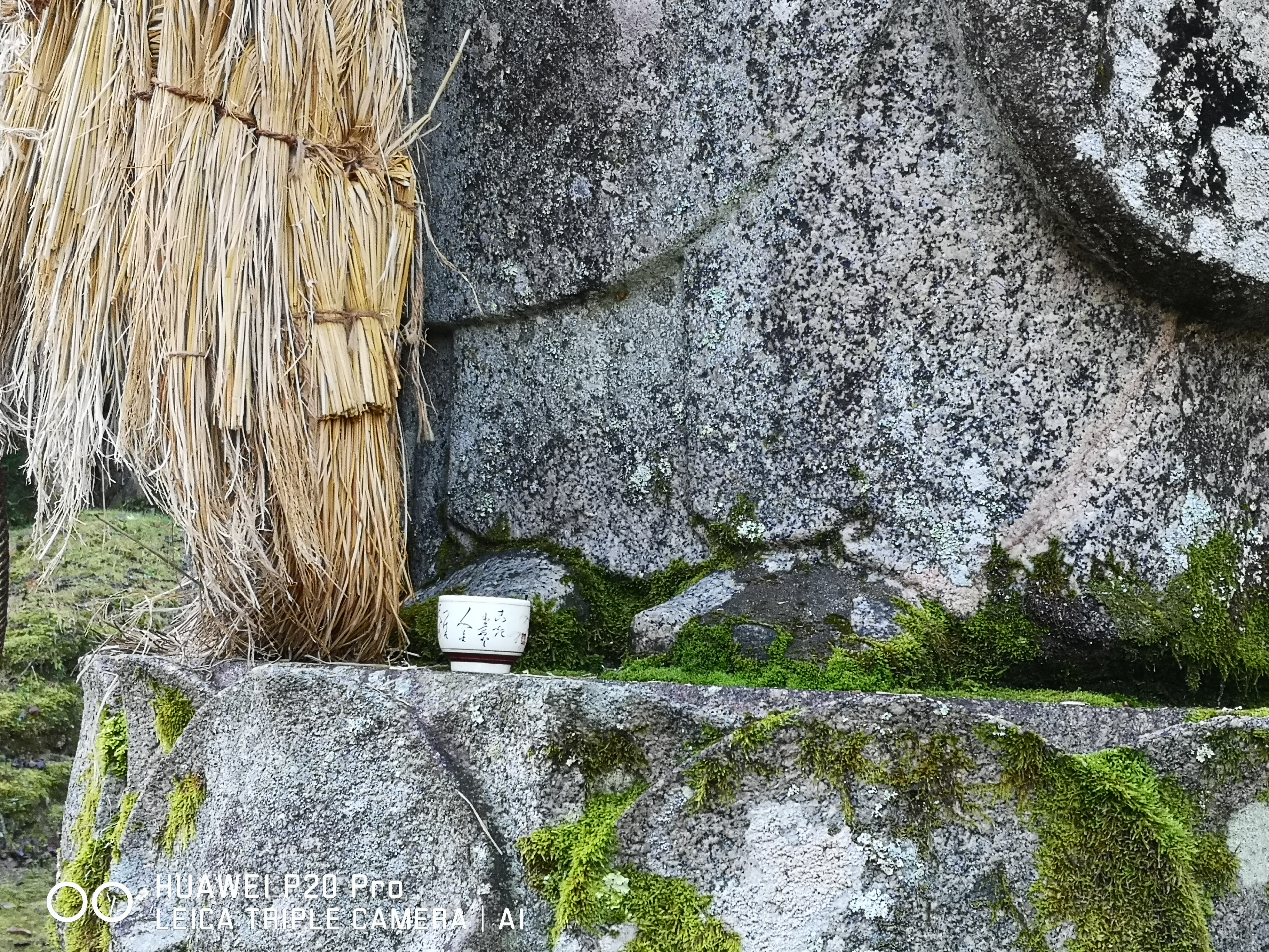 昭和２年の丹後大震災で転倒し、足の指を一部欠損した。